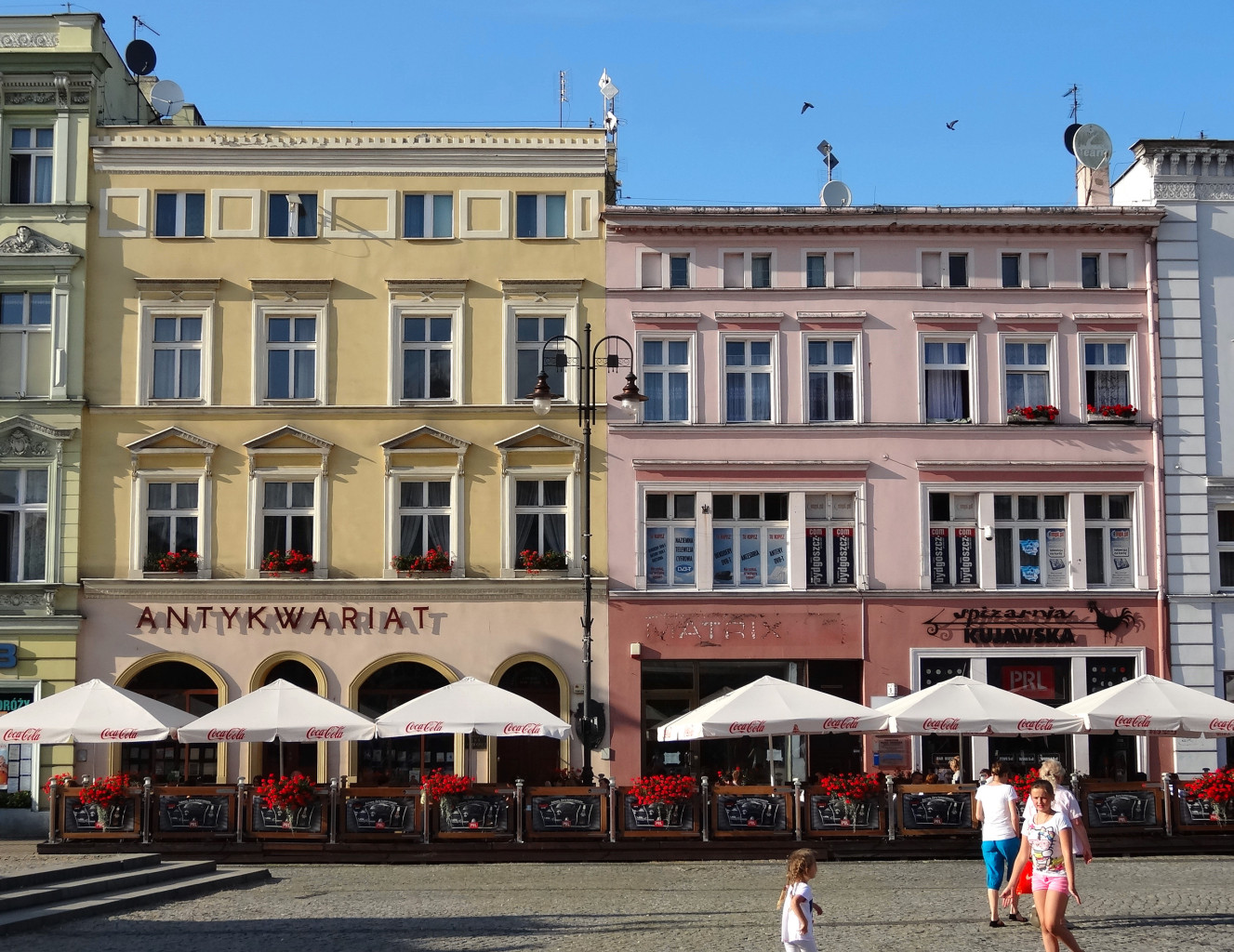 Północna pierzeja Starego Rynku w Bydgoszczy